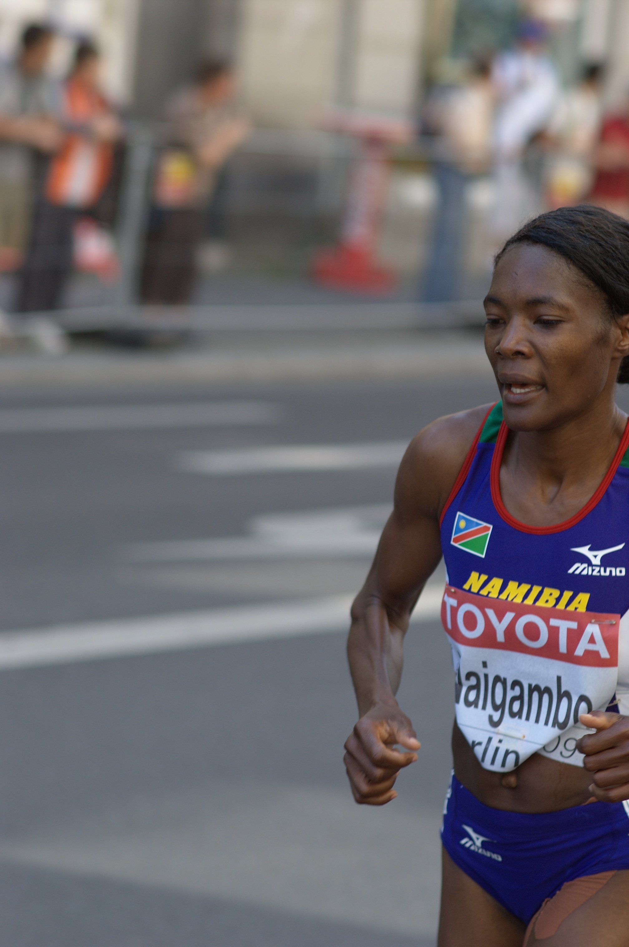 Leichtathletik Weltmeisterschaft Berlin 2009, Frauen-Marathon. Beata Naigambo.